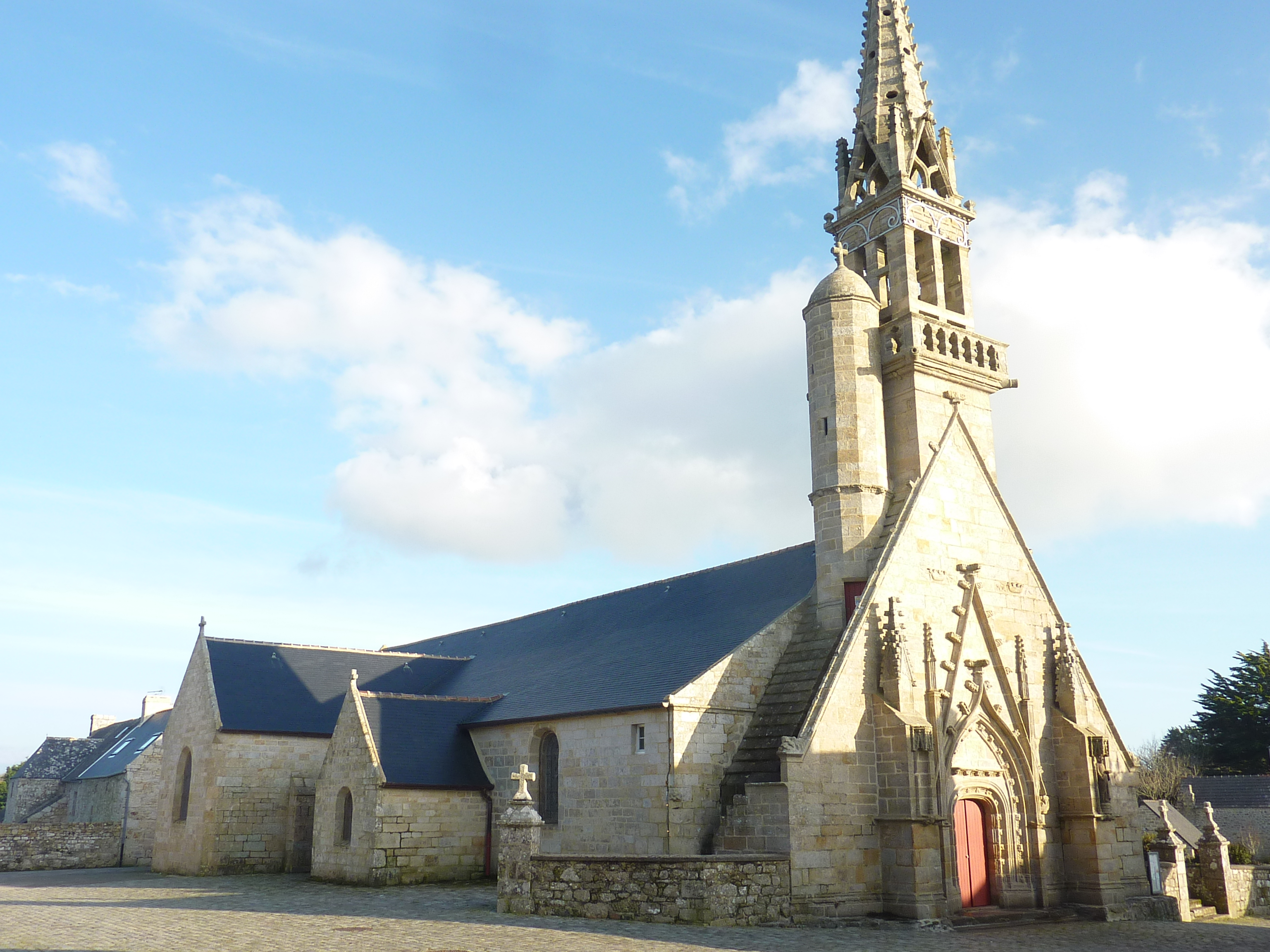 Plogoff : l'église paroissiale Saint-Colladan : façade ouest et côté nord